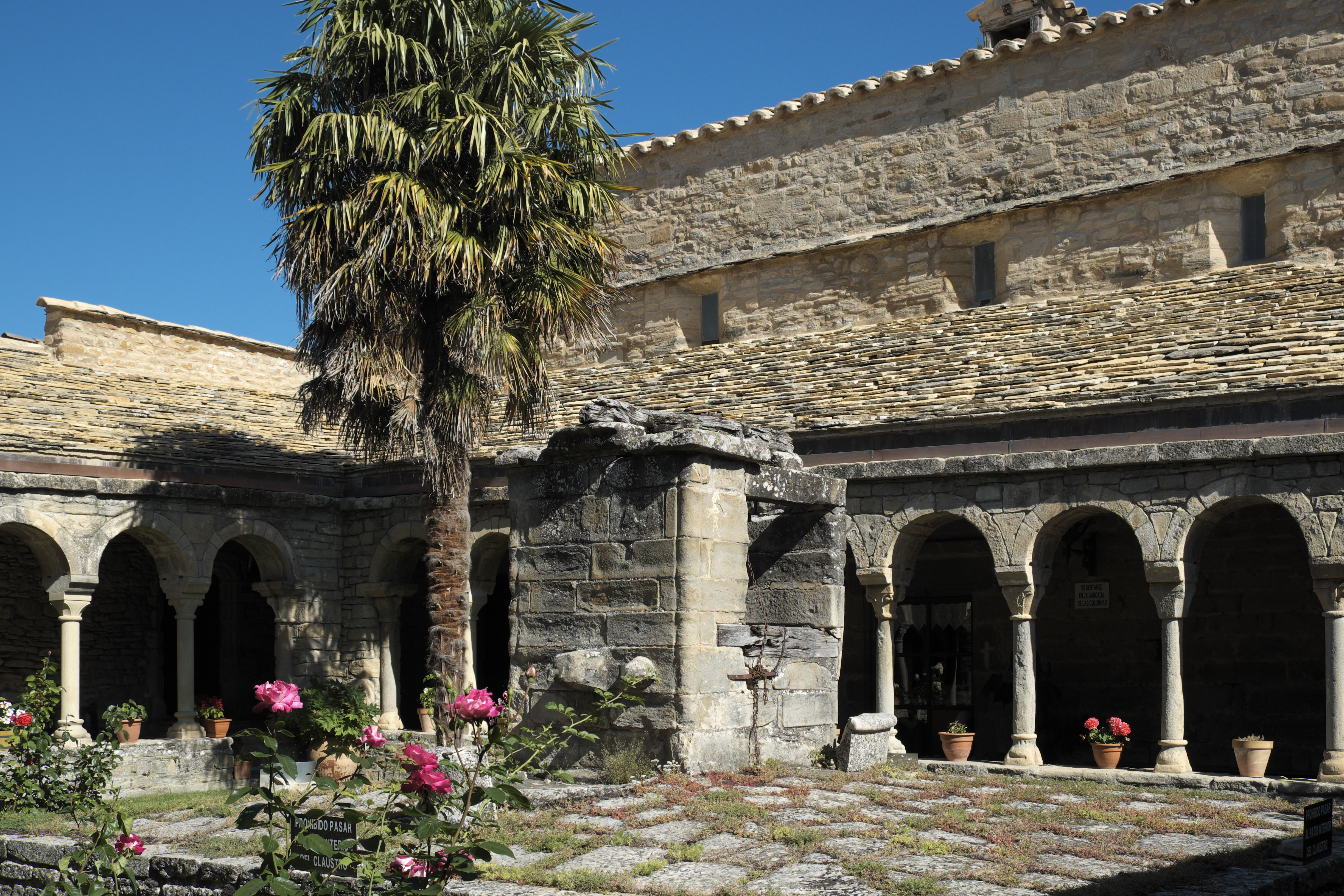 Kreuzgang der Kathedrale San Vicente in Roda de Isábena in der Provinz Huesca (Aragón/Spanien)